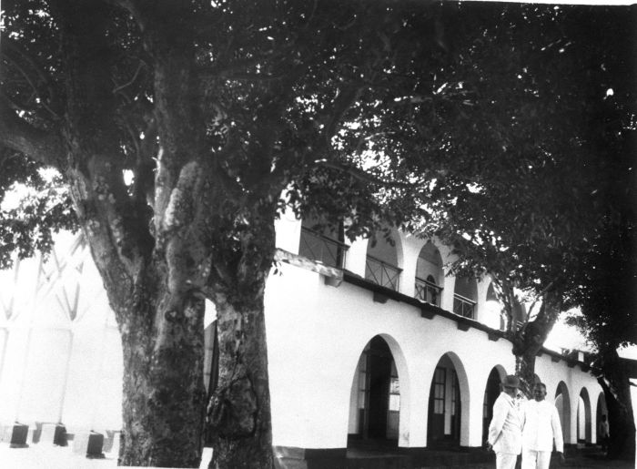 Foto. Ziekenhuis op het quarantaine eiland Onrust voor de kust van Batavia